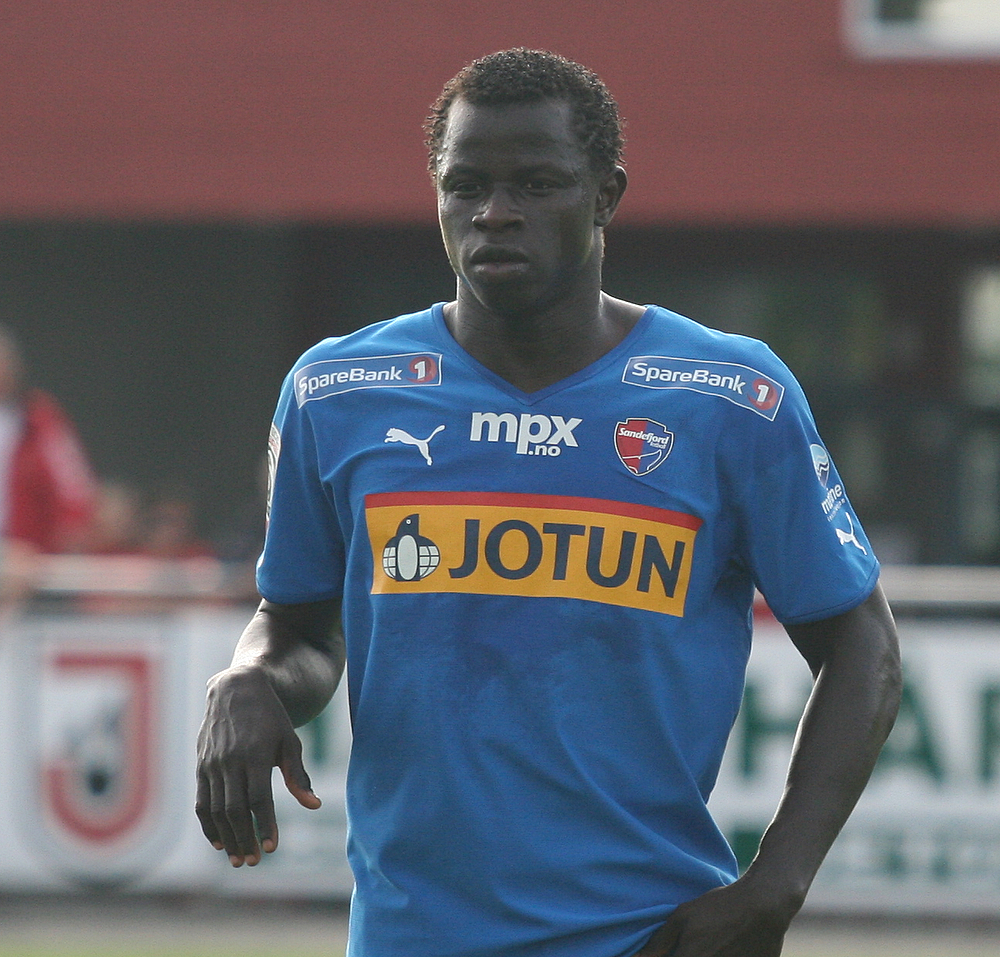 Malick Mane